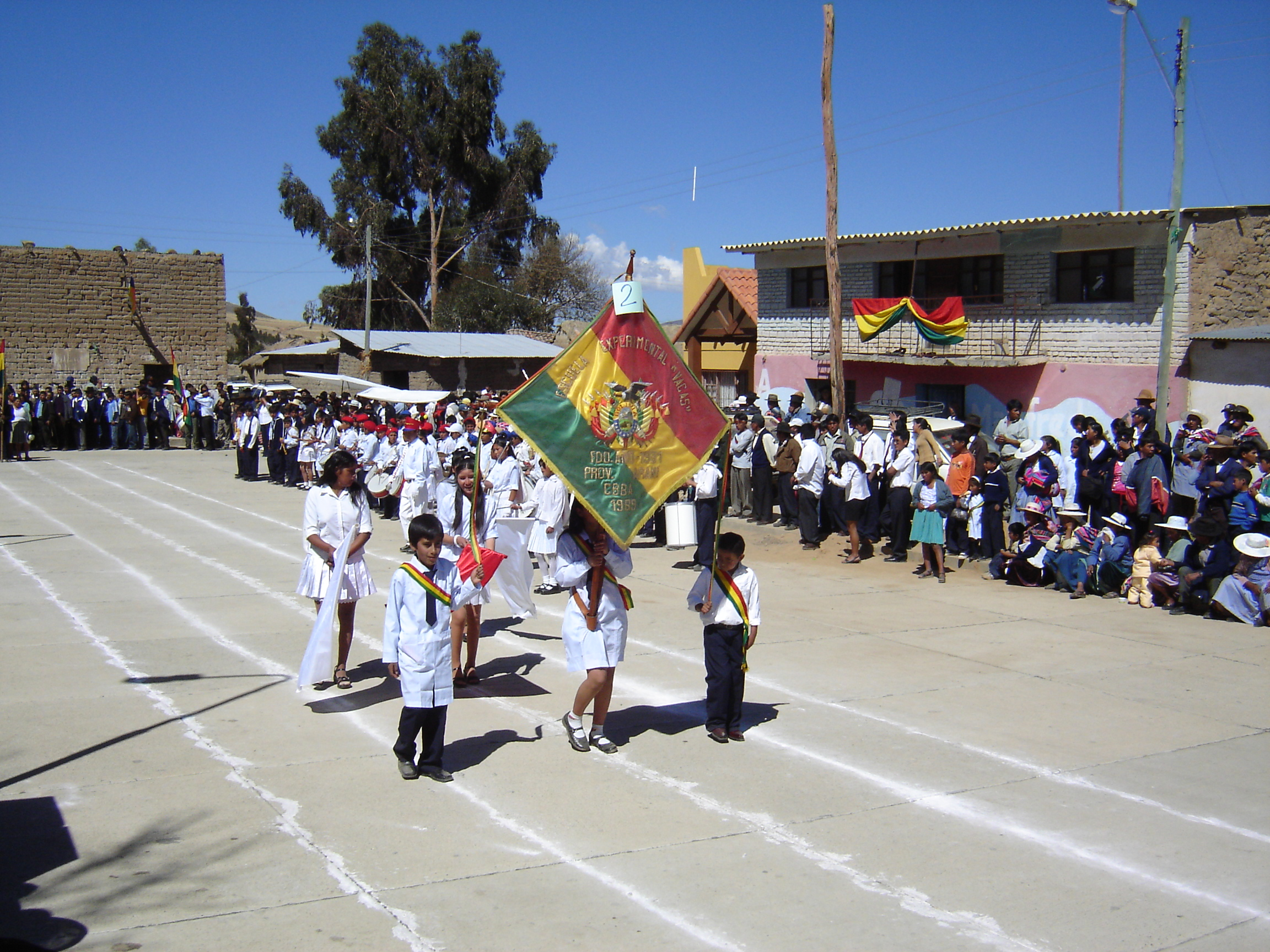 Alumnos de la Escuela Experimental de Vacas, durante el desfile cívico del 6 de agosto en homenaje a la Independencia del país, en la Plaza 4 de diciembre de Vacas.